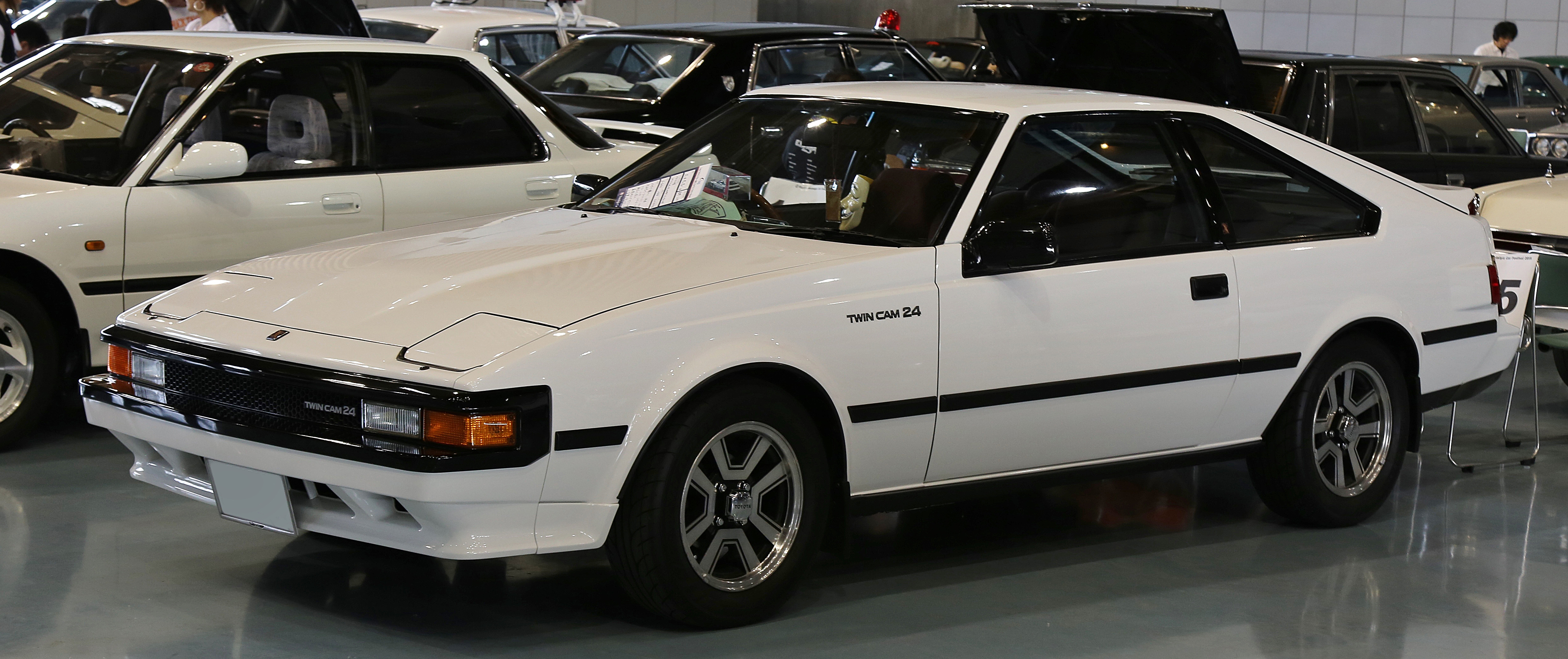 Toyota GA61